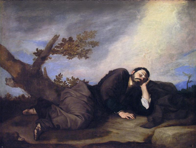 Pintura de Jacob soñando